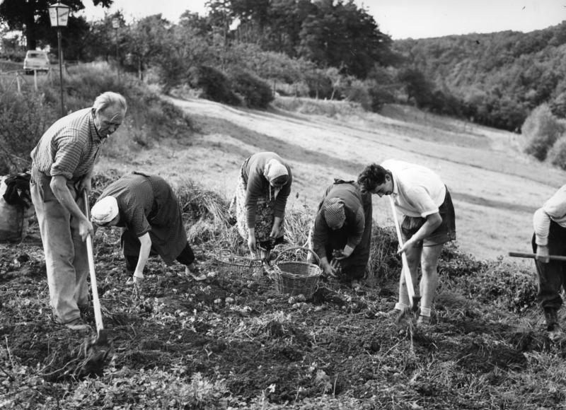 Landwirtschaftliche Aufnahmen bei Meckenheim (Eifel), 19.9.57 Kartoffelernte an der Kalenborner Höhe (Eifel)